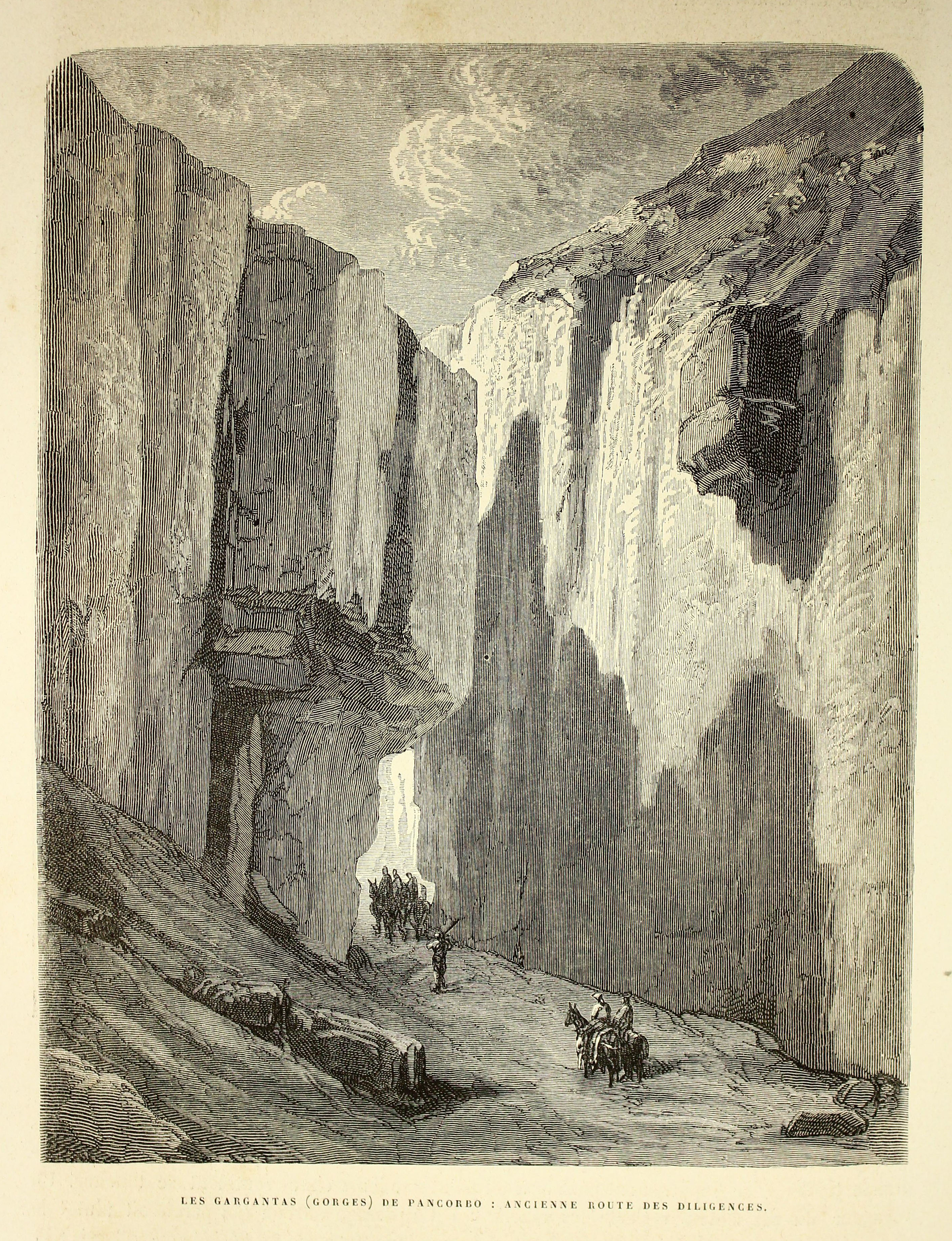 Autor: Davillier, Jean Charles, barón, 1823-1883 Descripción bibliográfica: L'Espagne / par Le Baron CH. Davillier ; ilustrée de 309 gravures dessinées su bois par Gustave Doré. - Paris : Librairie Hachette, 1874. - 799 p. : il. Materia: España- Geografía Materia: España- Usos y costumbres Ilustrador: Doré, Gustave, 1832-1883 Editor: Libreria Hachette Lugar de impresión: Francia, París Localización: Libro completo